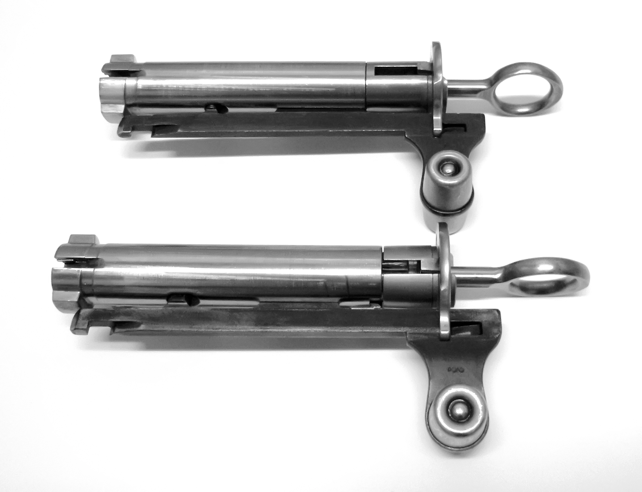 Comparaison du verrouillage de la culasse du K31 et du Zfk55